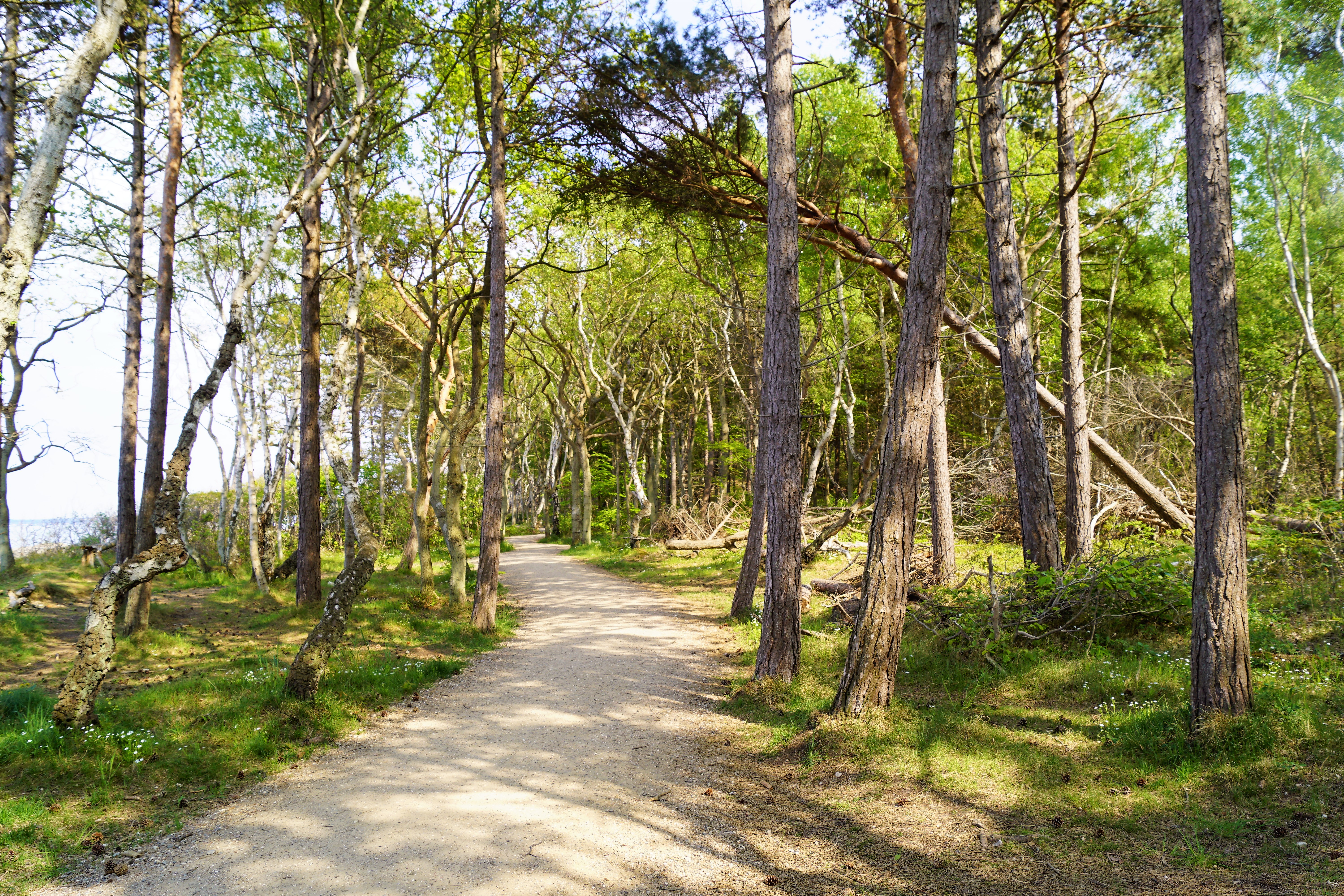 Sti i Hornbæk Plantage